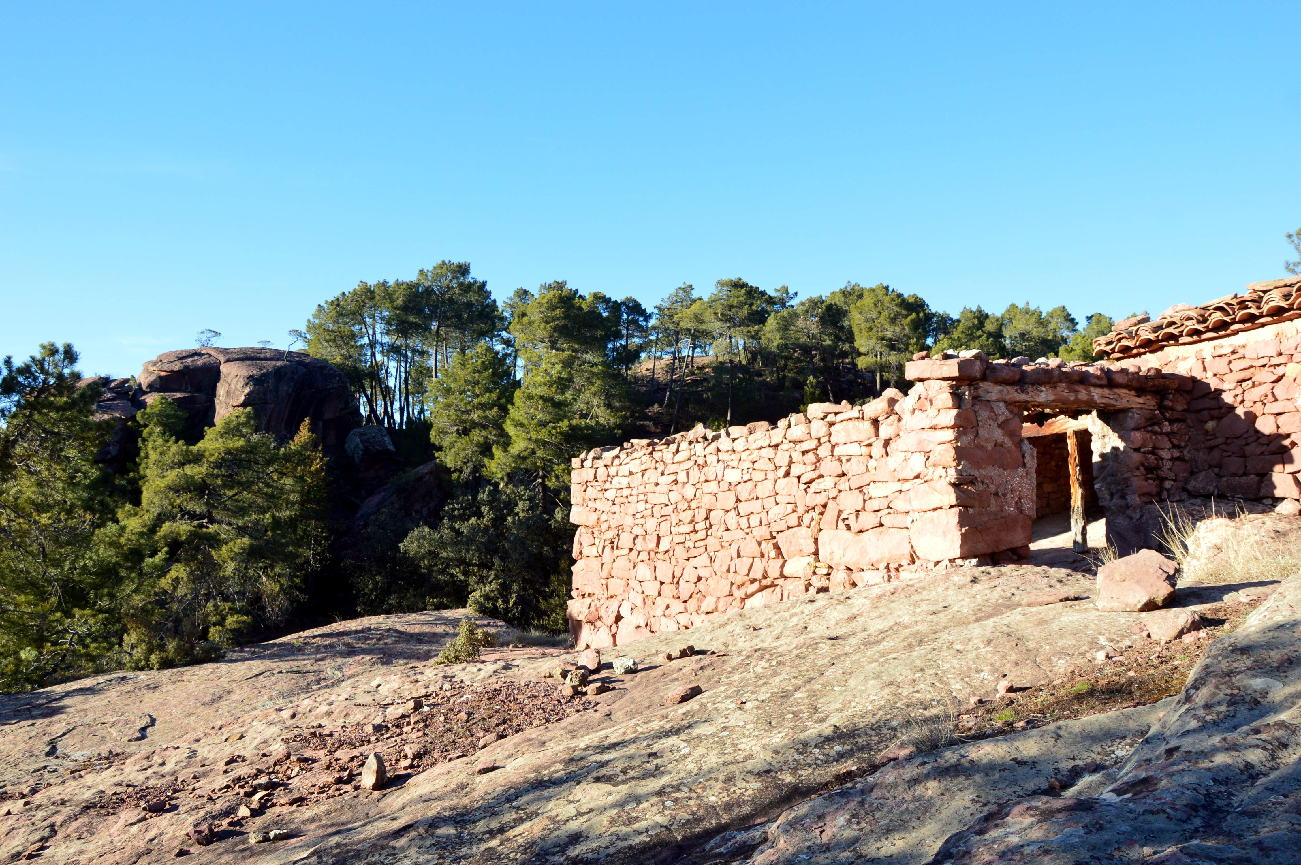 Detalle de muro en descubierto, Corrales de los Fantasmas en Castielfabib (Valencia), 2018.